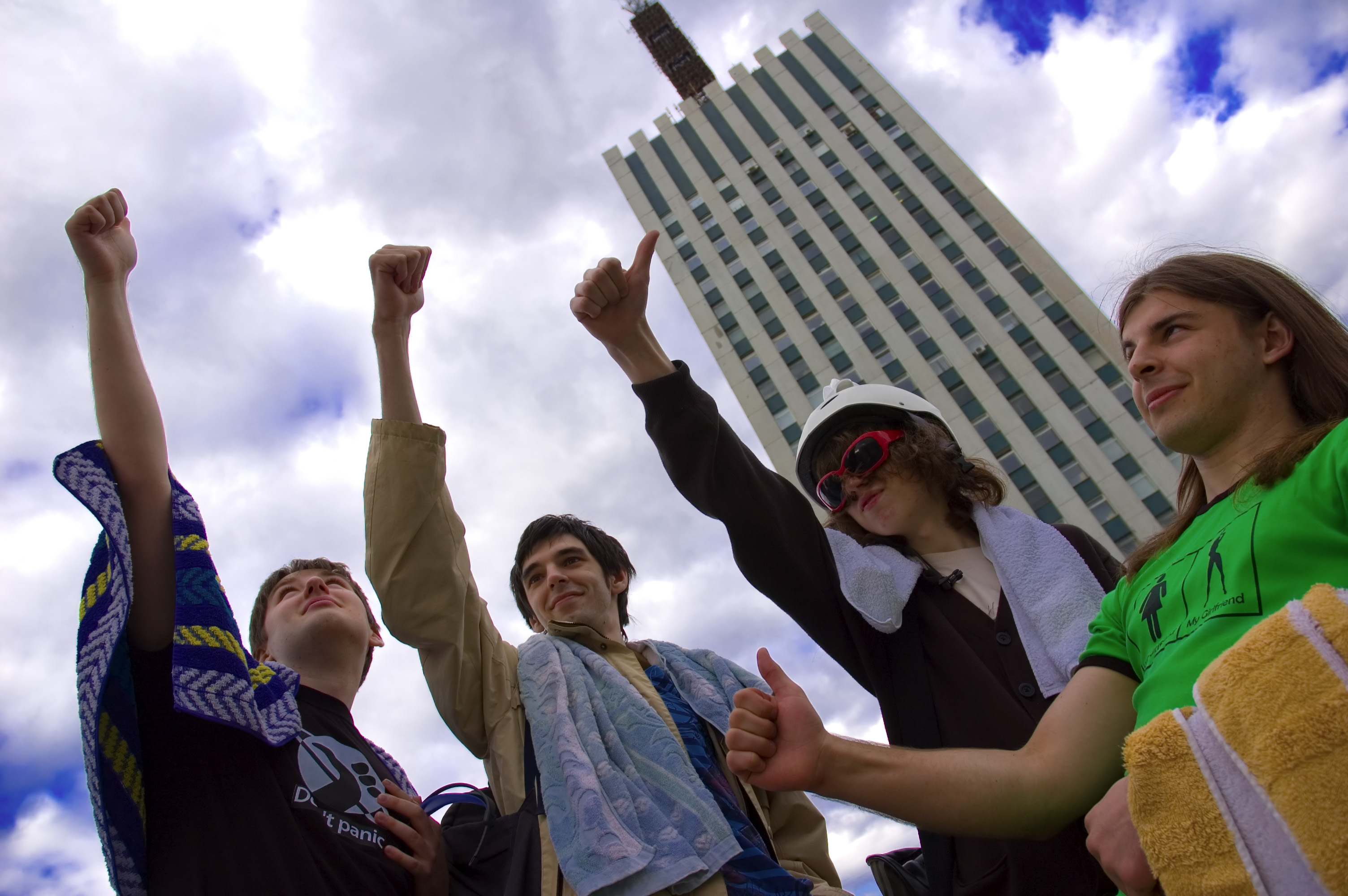 День полотенца в Архангельске